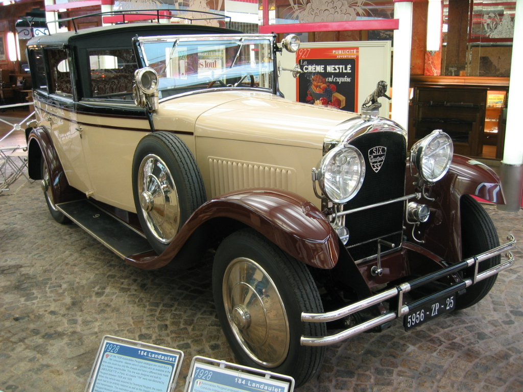 Peugeot Type 184 - Musée Peugeot Sochaux